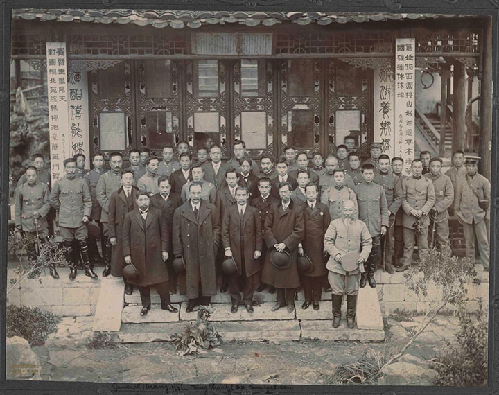 1912年3月29日，南京临时政府各部总次长、卫戍总督、各军师旅司令官，在南京愚园（胡家花园）的春晖堂为孙中山举行饯别会。最前面一人：王芝祥；第二排左起：黄兴、唐绍仪、孙中山、王宠惠、吕志伊；第三排左1马君武、左2俆绍桢、左4魏宸组、左5黄钟英、左6黄郛、左7朱瑞、左8姚雨平；第四排左2陈懋修、左3柏文蔚、左5居正、左6景耀月、左7蔡元培、左8王鸿猷、左9朱卓文。 愚园位于南京城西南隅，初建于明代，为中山王徐达后裔徐傅的别业附园，名“西园”。1873年任苏州知府的金陵人胡恩燮（字煦斋）辞归故里，购得西园遗址。1874年他仿照苏州狮子林，在此建立了清远堂、春晖堂、水石居等36景，取名“愚园”，成为金陵著名的私家园林之一，俗称胡家花园。从照片中可以清楚地看到愚园春晖堂门柱上的两幅楹联： 旧址拓西园，接山城迤逦，水木清华，湛露昔承恩，胜国雄藩休沐地； 新图规北苑，经杨柳池台，蘼芜门径，飞英重作会，嘉宾贤主艳阳天。 烟霞供养斯得上寿，诗酒酣嬉能娱古欢。